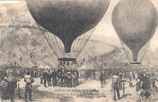 Scènes du siège de Paris. Départ du Ballon Armand Barbès monté par Gambetta, le [?] octobre 1870, carte postale ancienne.